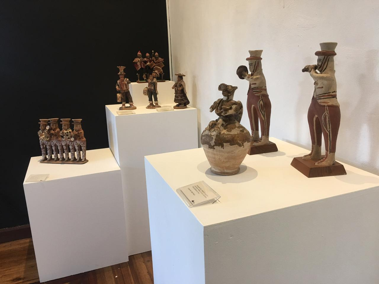 Artesanías exhibidas en el Museo CIDAP Nombre del Objeto: Músicos Materia prima: arcilla y esmalte Procedencia: Perú Colección: Olga Fisch